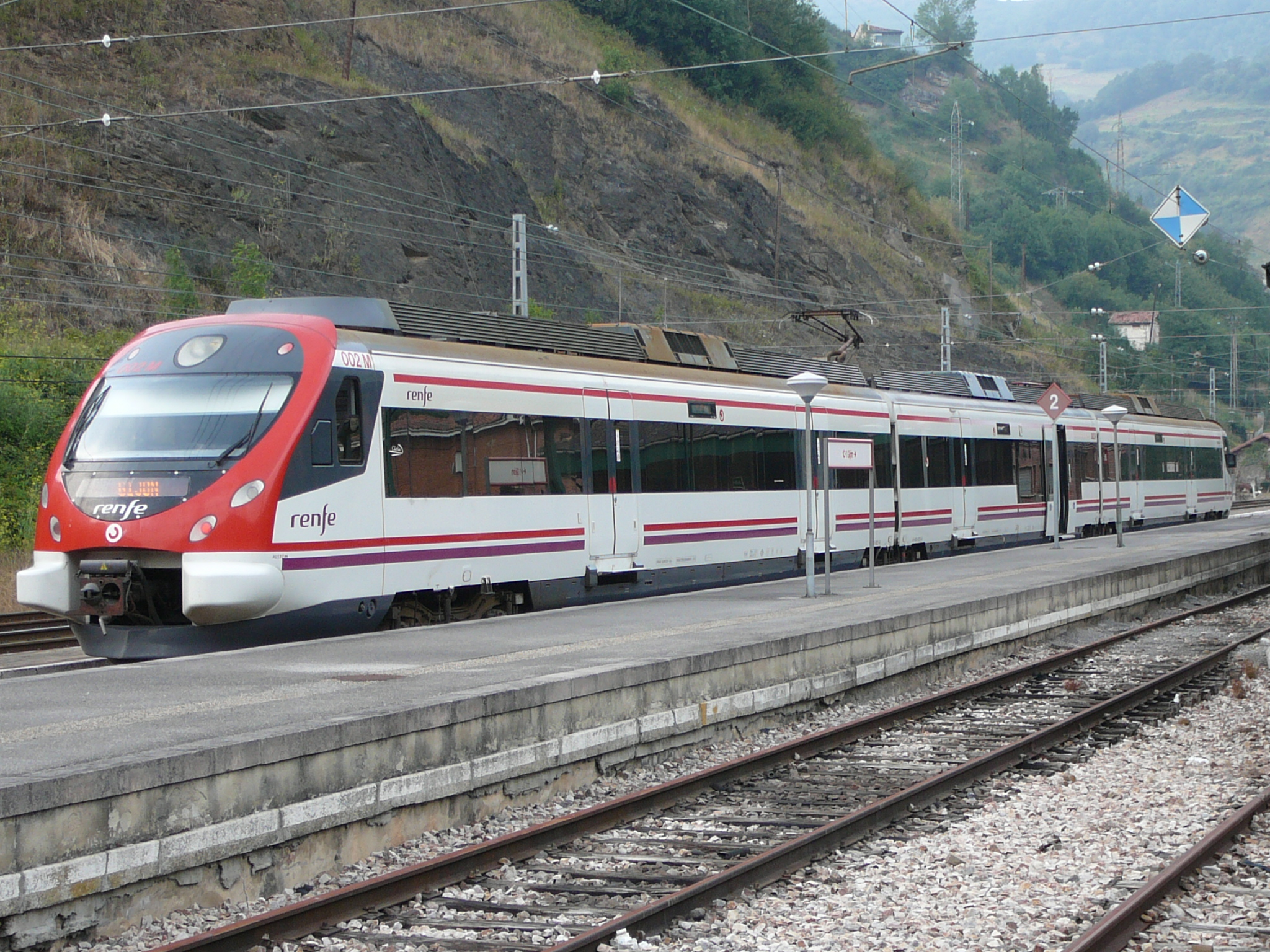 Tren Civia en la estación de Puente Los Fierros (Asturias)